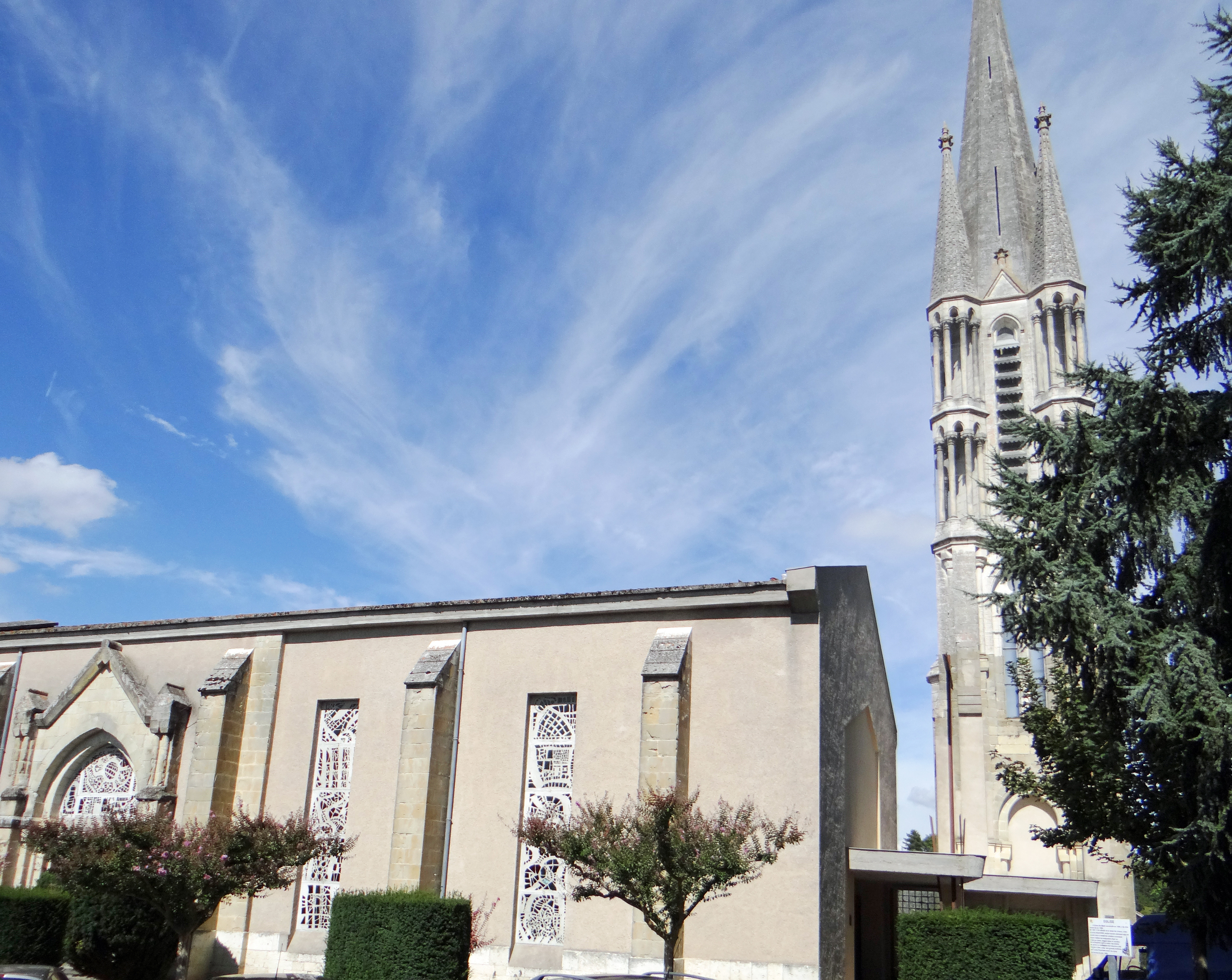 Miramont-de-Guyenne - Église Sainte-Marie